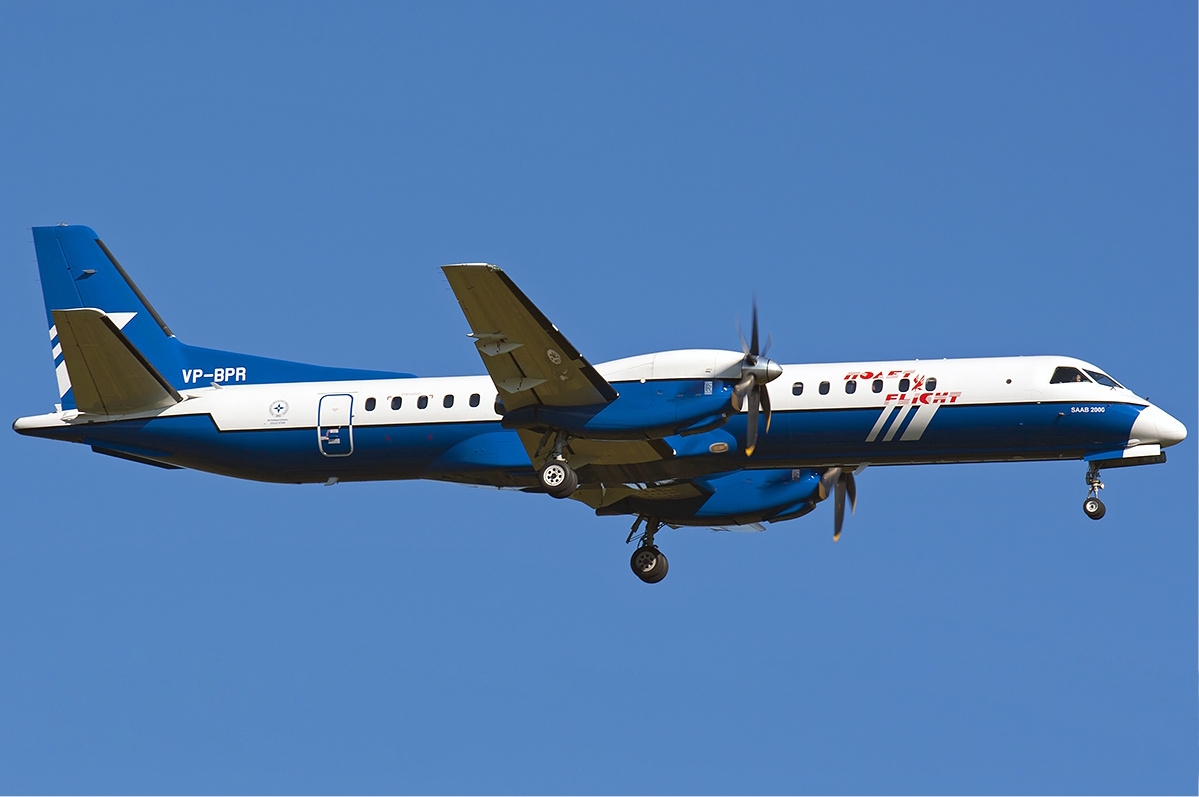 Polet saab 2000